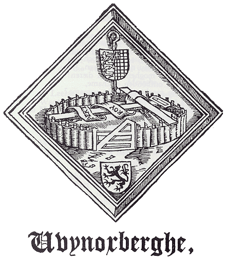 Blazoen van de Royaerts-Baptisten, rederijkerskamer van Sint-Winoksbergen (Frans: Bergues)